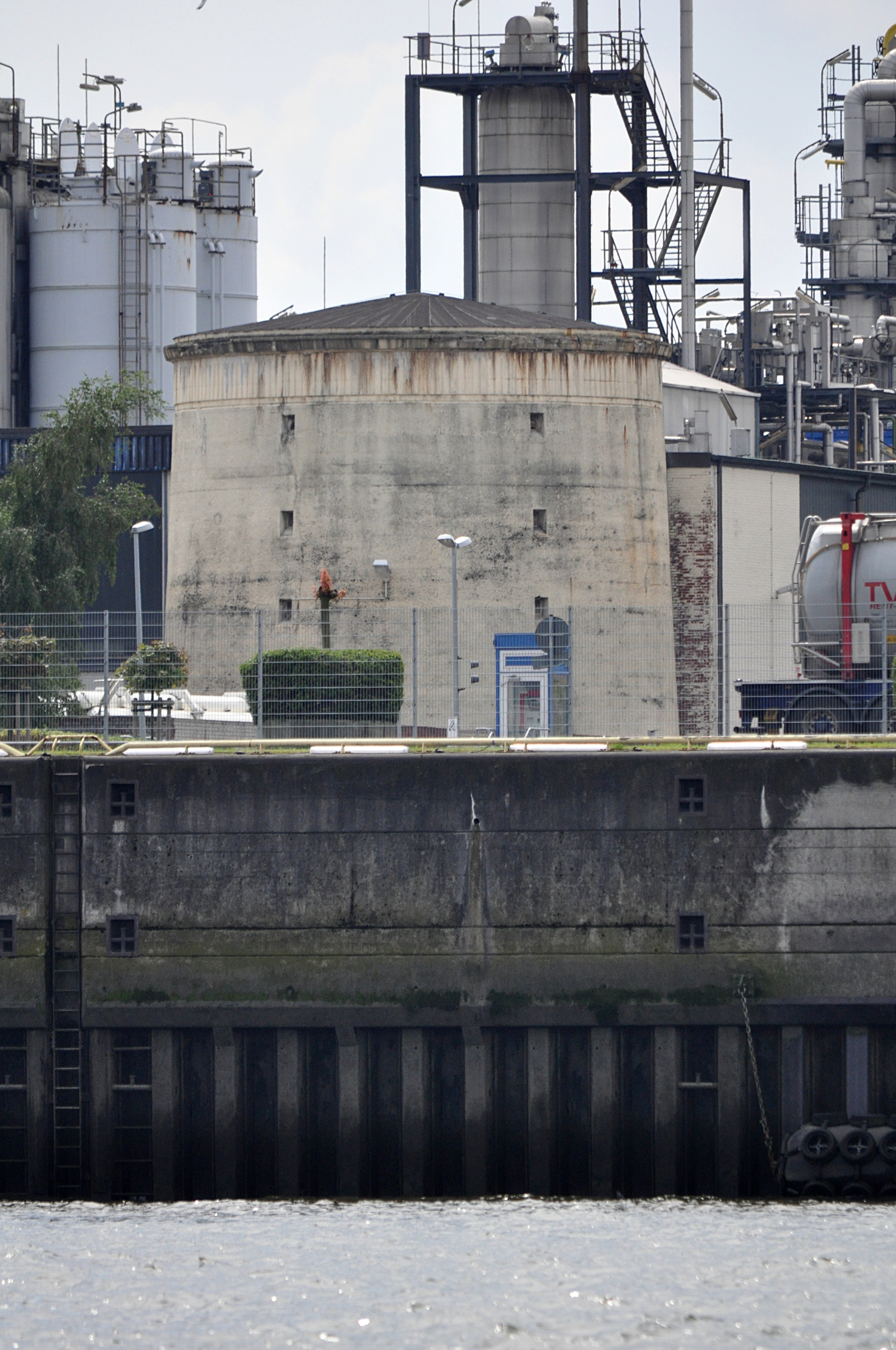 Ringtreppenturm Worthdamm 27 in Hamburg-Steinwerder. This is a photograph of an architectural monument.